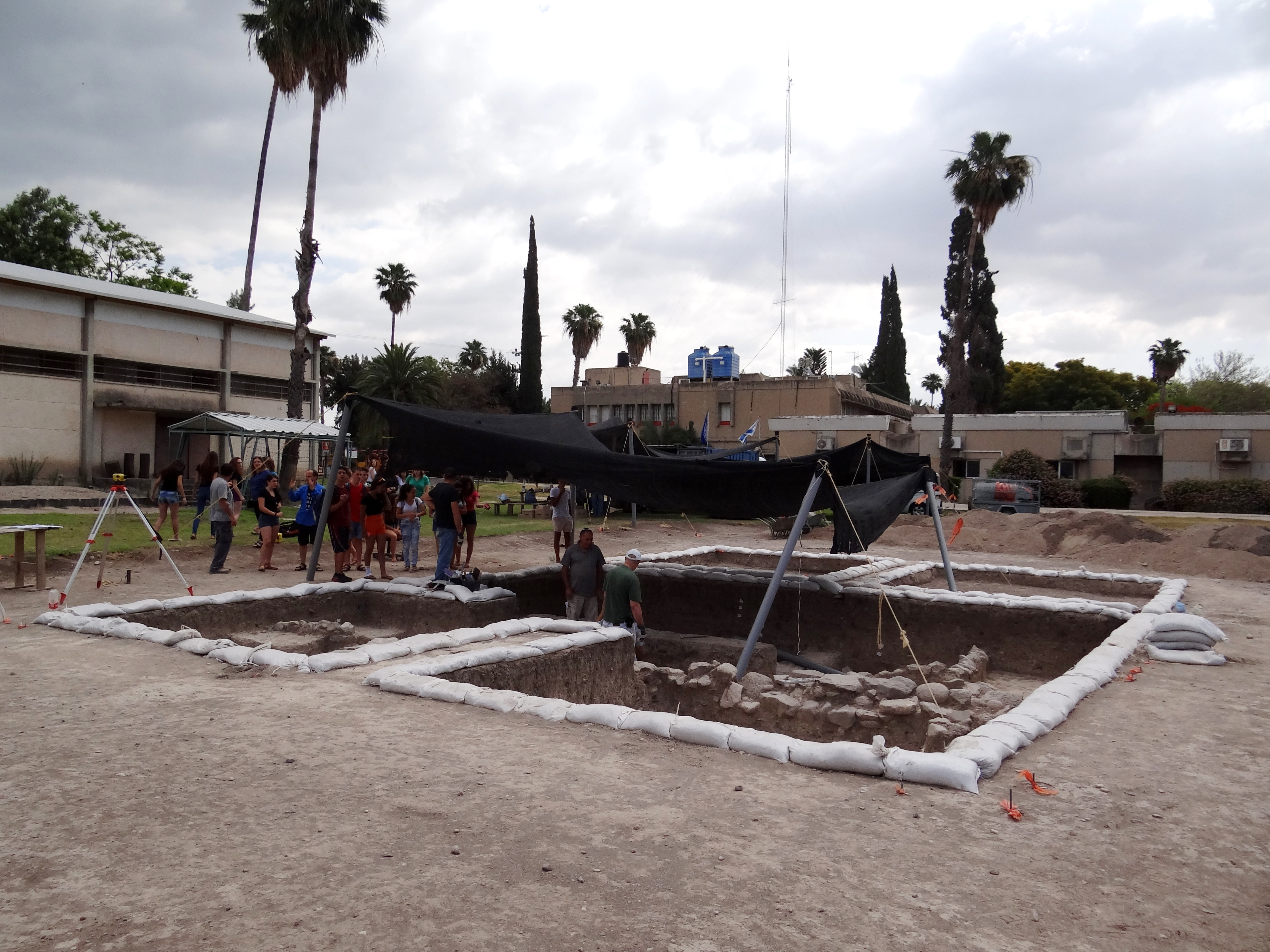 תל בית ירח אתר ארכאולוגי בחופה הדרומי של הכנרת. על חלק מהאתר נמצא בית הספר התיכון האזורי בית ירח. בחודש מאי 2014 נערכו חפירות הצלה בשטח בית הספר, בשטח שיועד להקמת אולם ספורט. בחפירה נמצאו שרידי מבני מגורים שחלקם הופרדו על ידי סמטה צרה . נמצאו גם פכים שלמים מחרס ברמת גימור הרומזת שאולי הכילו נוזל כמו יין או שמן. הממצאים מתוארכים מלפני 4,800 שנים נחפירה נוהלה על ידי ד"ר אמיר גולני מרשות העתיקות.. החפירה הסתיימה ביום 1 ביוני 2014, והאתר שנחפר כוסה. מעליו יבנה בית הספר, תמונות אלה שצולמו ביום האחרון לחפירה לא ניתן לצלם עוד.